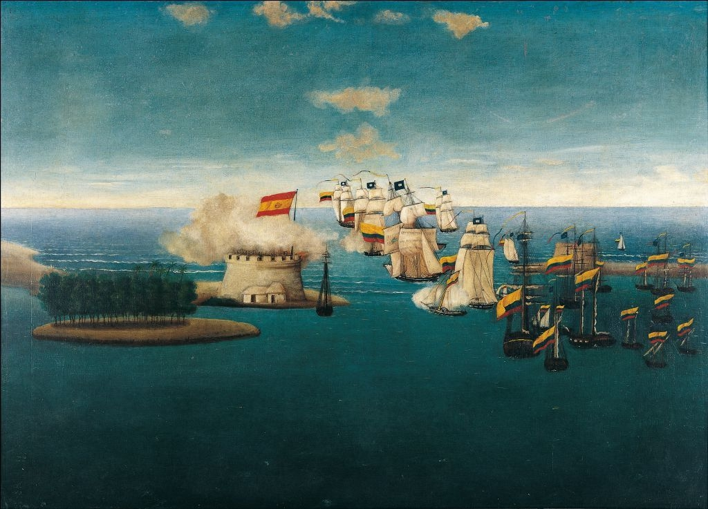 Acción del Castillo de Maracaibo (1823) Óleo sobre tela (87 x 124 cm), tomado del Museo Nacional de Colombia.